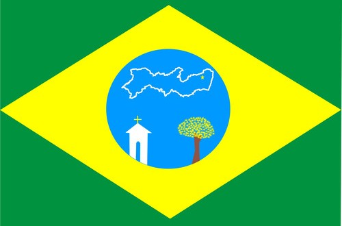 Bandeira de Bom Jardim PE